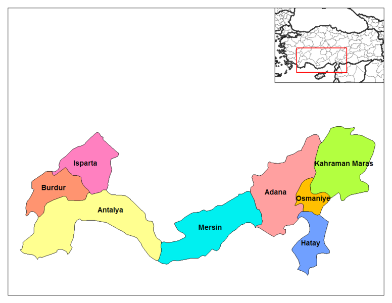 Aralıq dənizi bölgəsi vilayətləri.